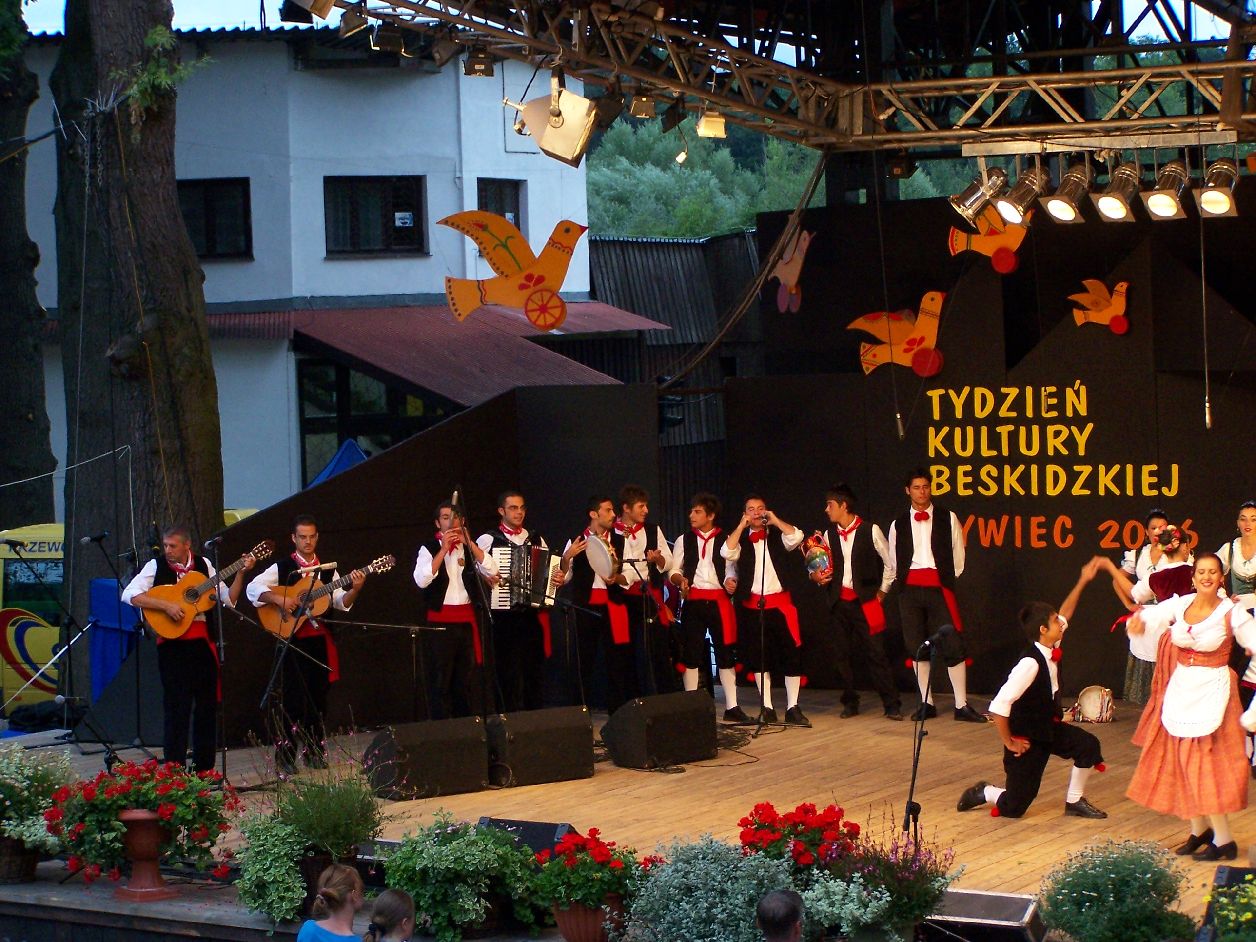 Występ zespołu Antiche Tradizioni Popolari z Agrigento (Sycylia) podczas 43. Tygodnia Kultury Beskidzkiej w Żywcu.